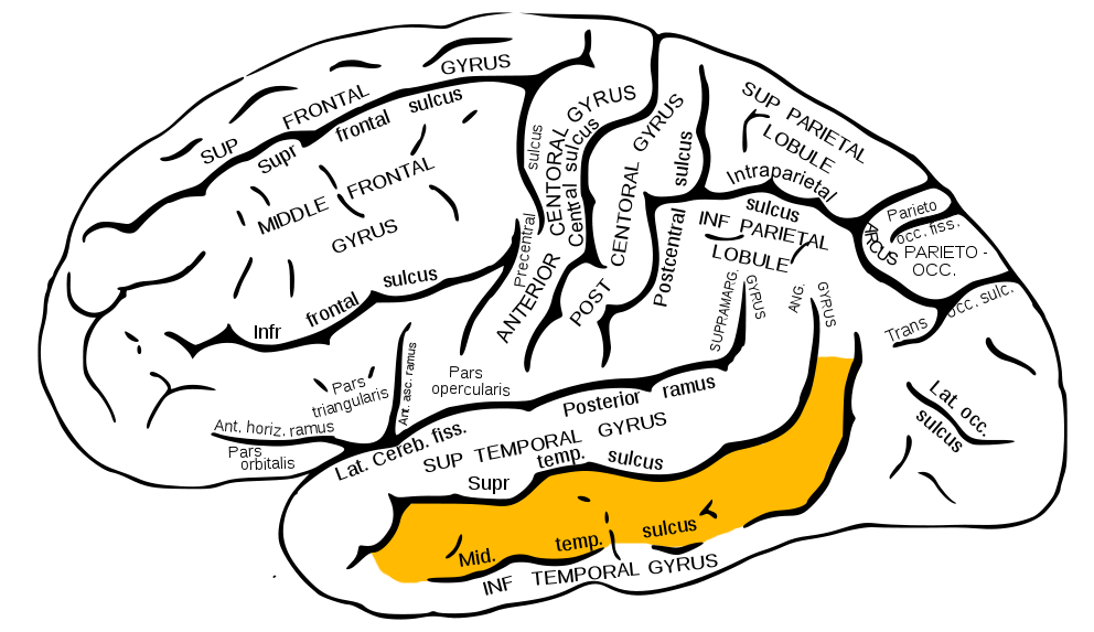 middle temporal gyrus.